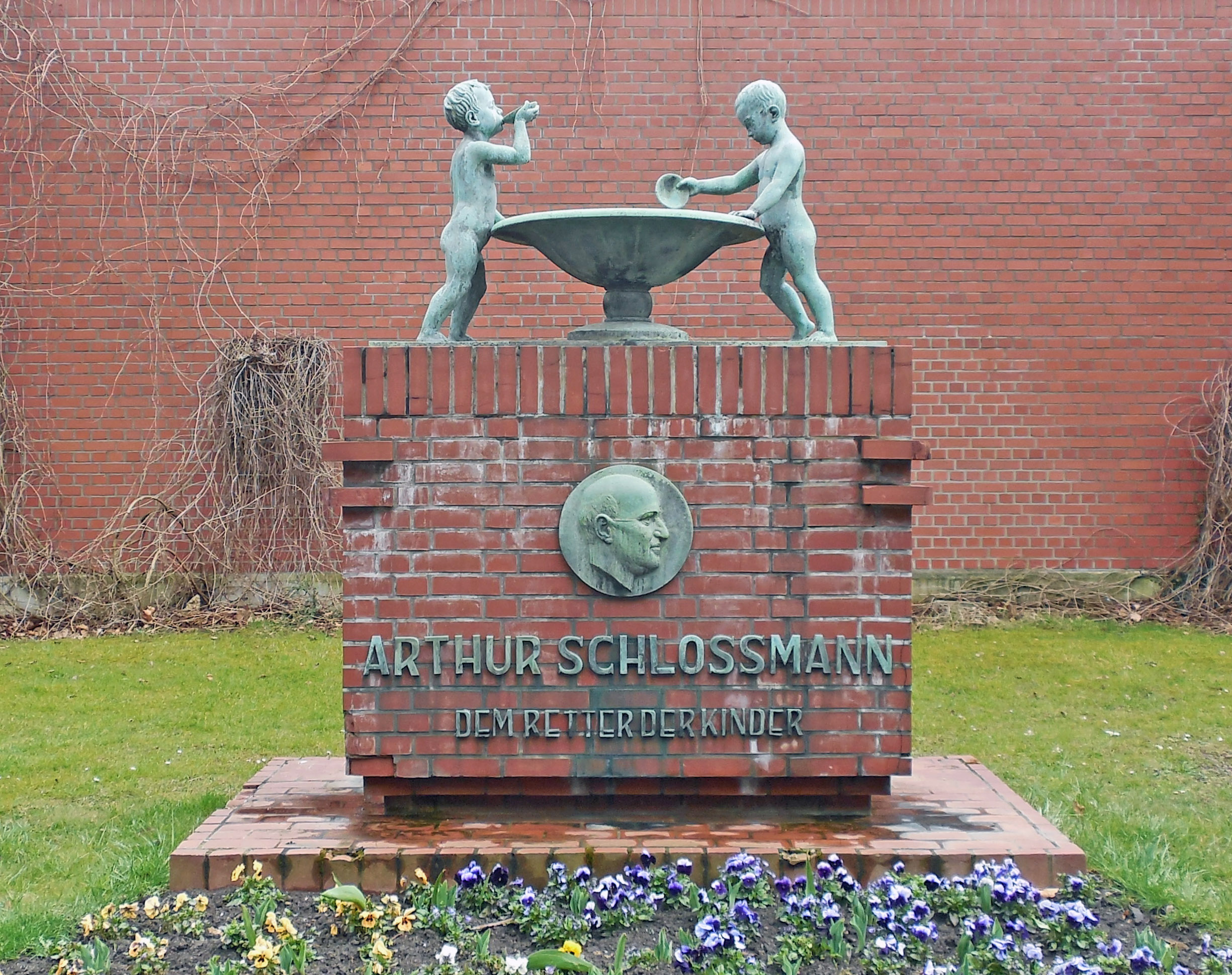 Arthur Schlossmann Denkmal, Uniklinik Düsseldorf